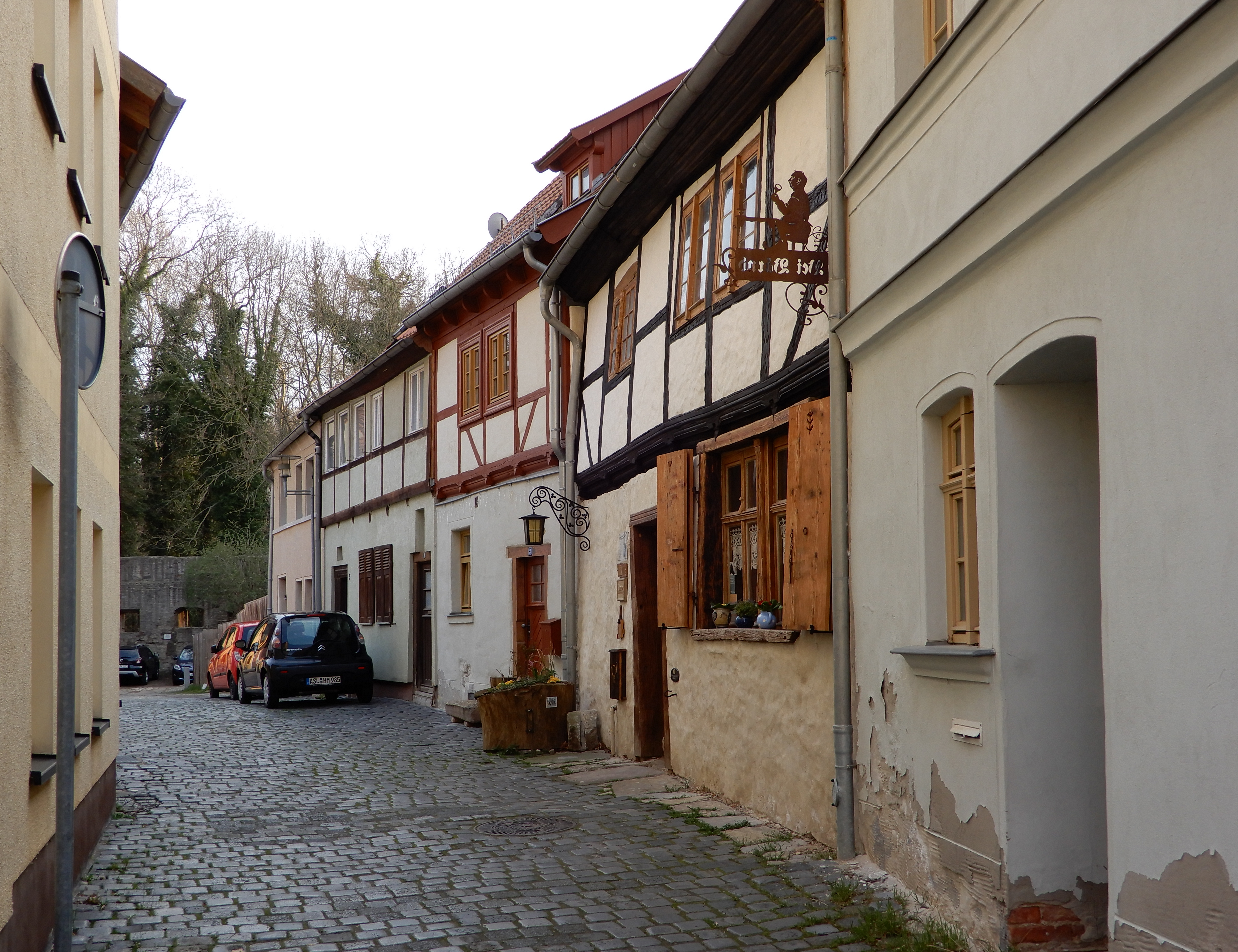 Gebäude Mauerstraße 2-5 in Aschersleben